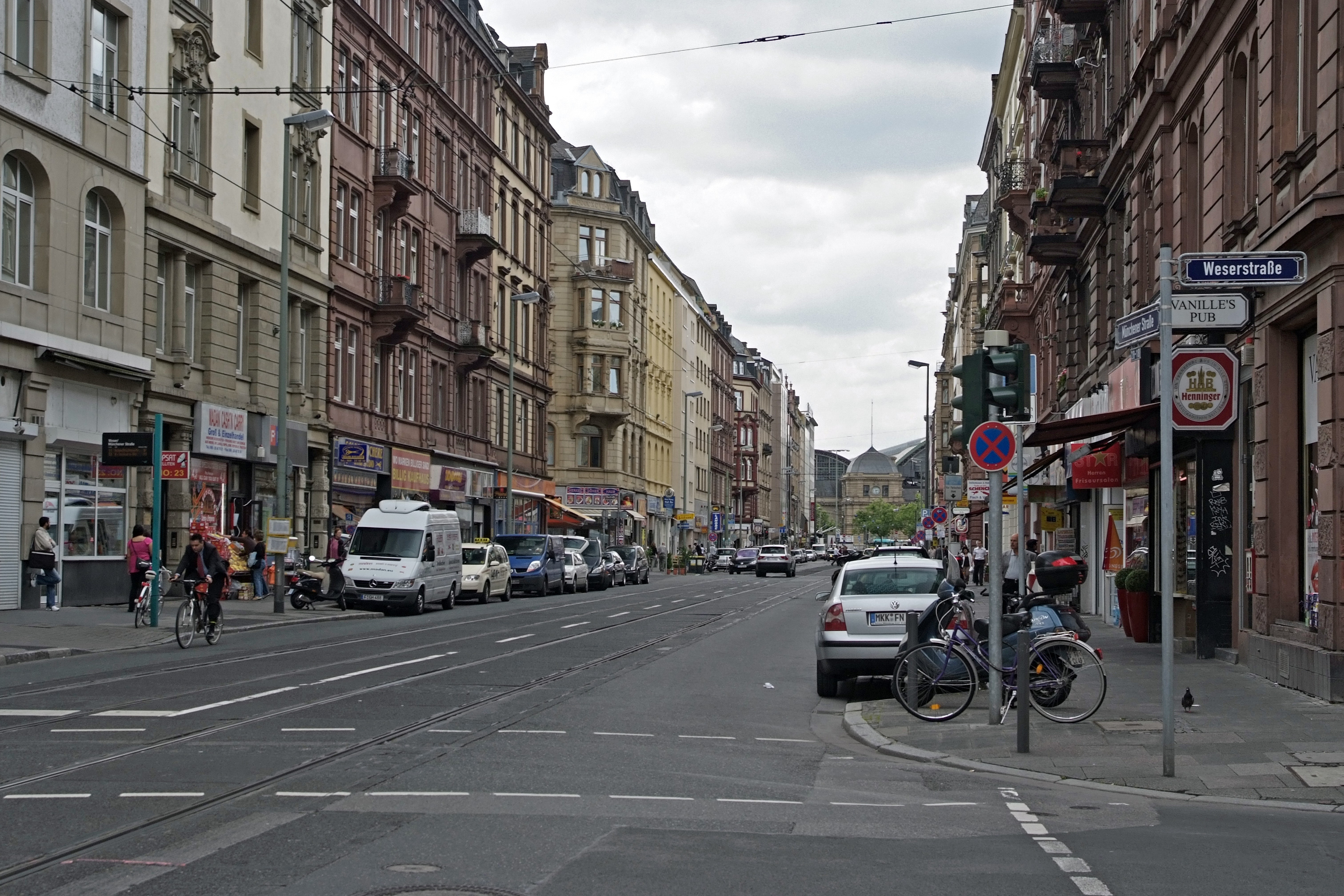 Münchener Straße im Frankfurter Bahnhofsviertel, Ecke Weserstraße